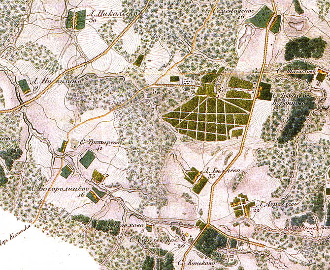 Участок. Топографическая карта окружности Москвы, снятая офицерами Квартирмейстерской части 1818 года. Гравирована и печатана в военно-топографическом бюро при Главном штабе его Императорского Величества 1823 года.